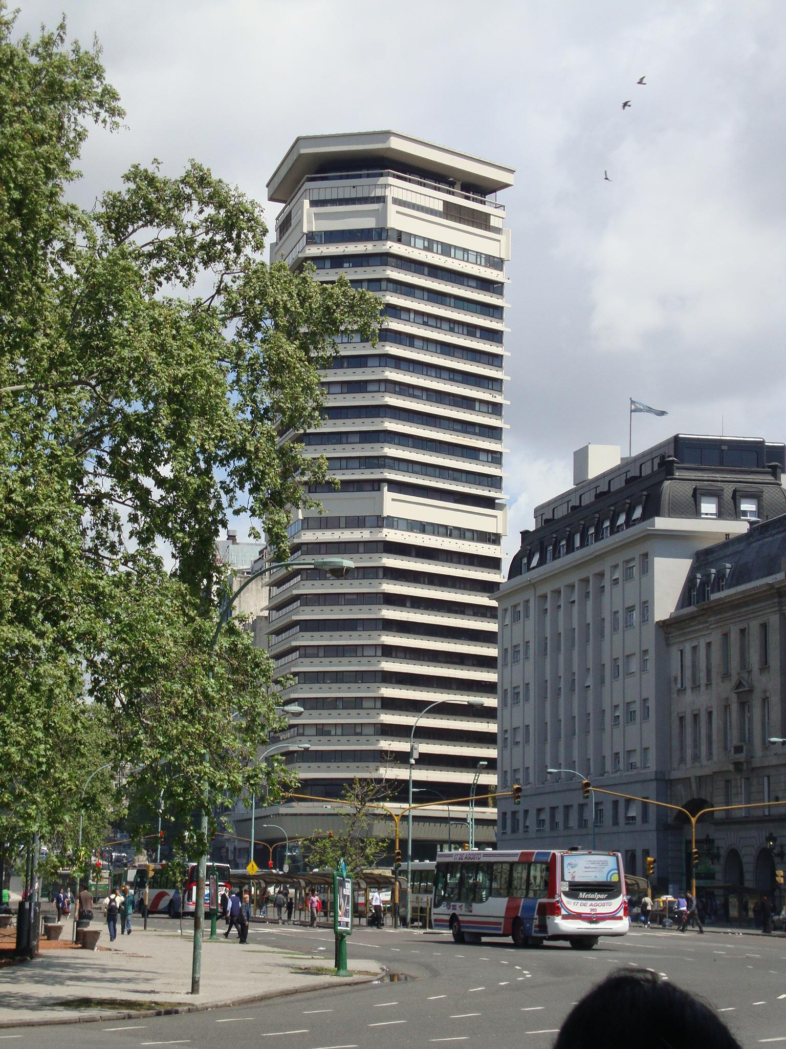 La Torre Pirelli (1974), obra del arquitecto Mario Bigongiari, vista desde el sector de paradas de ómnibus colectivos urbanos de la Plaza Canadá, frente a la terminal ferroviaria de Retiro. Buenos Aires, Argentina.